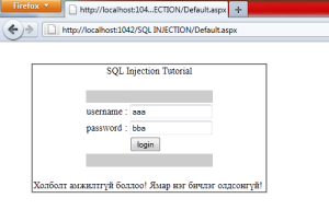 Монгол: login error